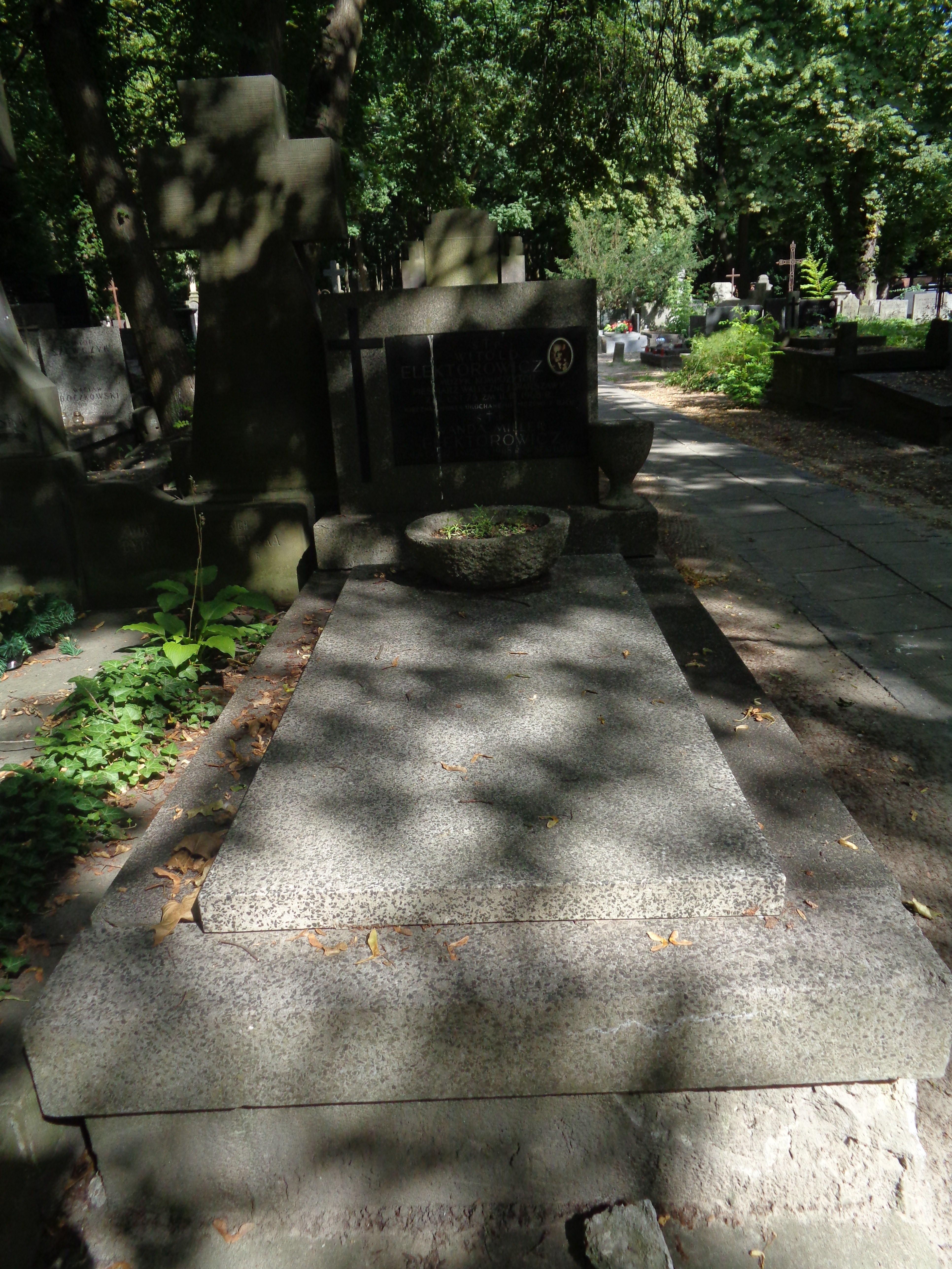 Grób Witolda Elektorowicza